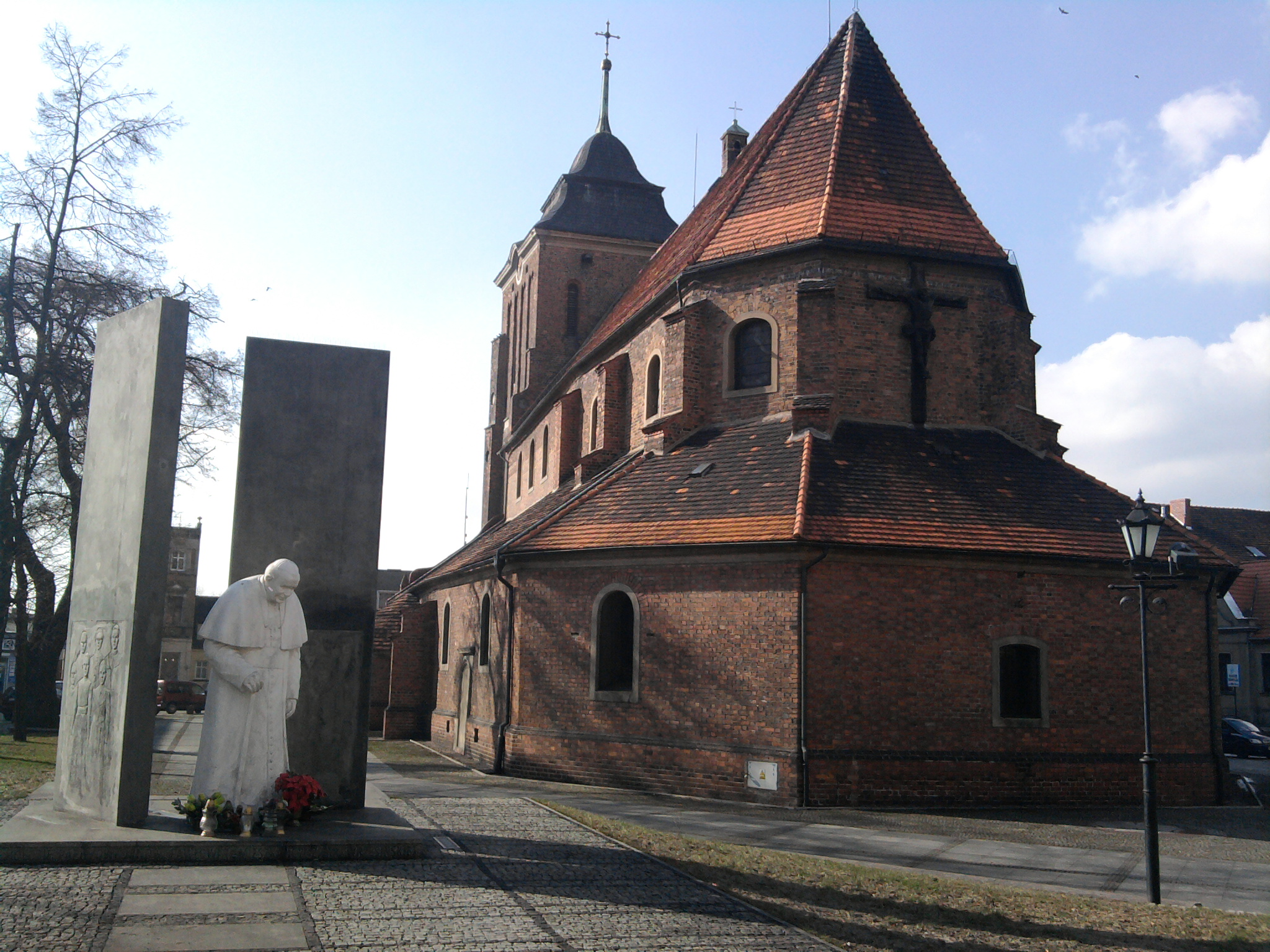 Kościół farny p.w. Wniebowzięcia NMP i św. Stanisława BM z pomnikiem Jana Pawła II